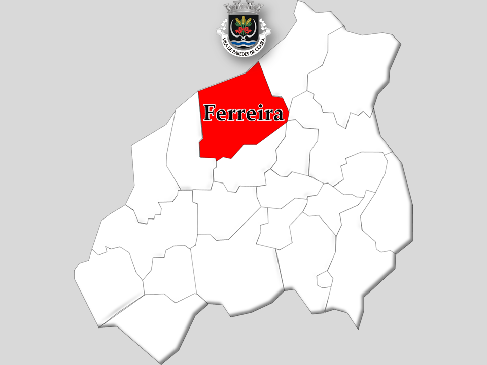 Censos 1864/2011